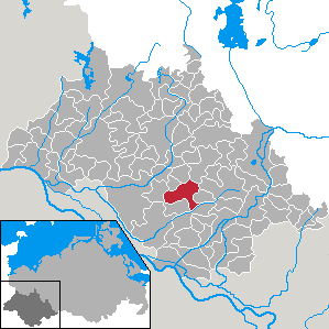 Alt Krenzlin in Mecklenburg-Vorpommern - district Ludwigslust